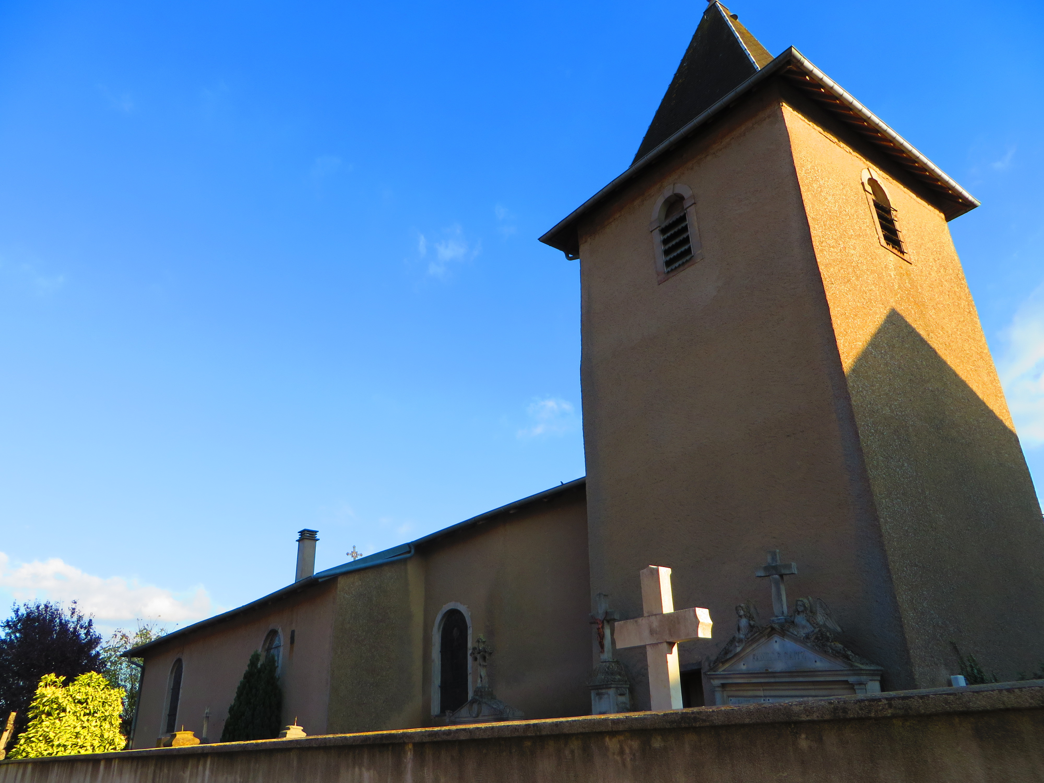 Wuisse l'église Saint-Pierre